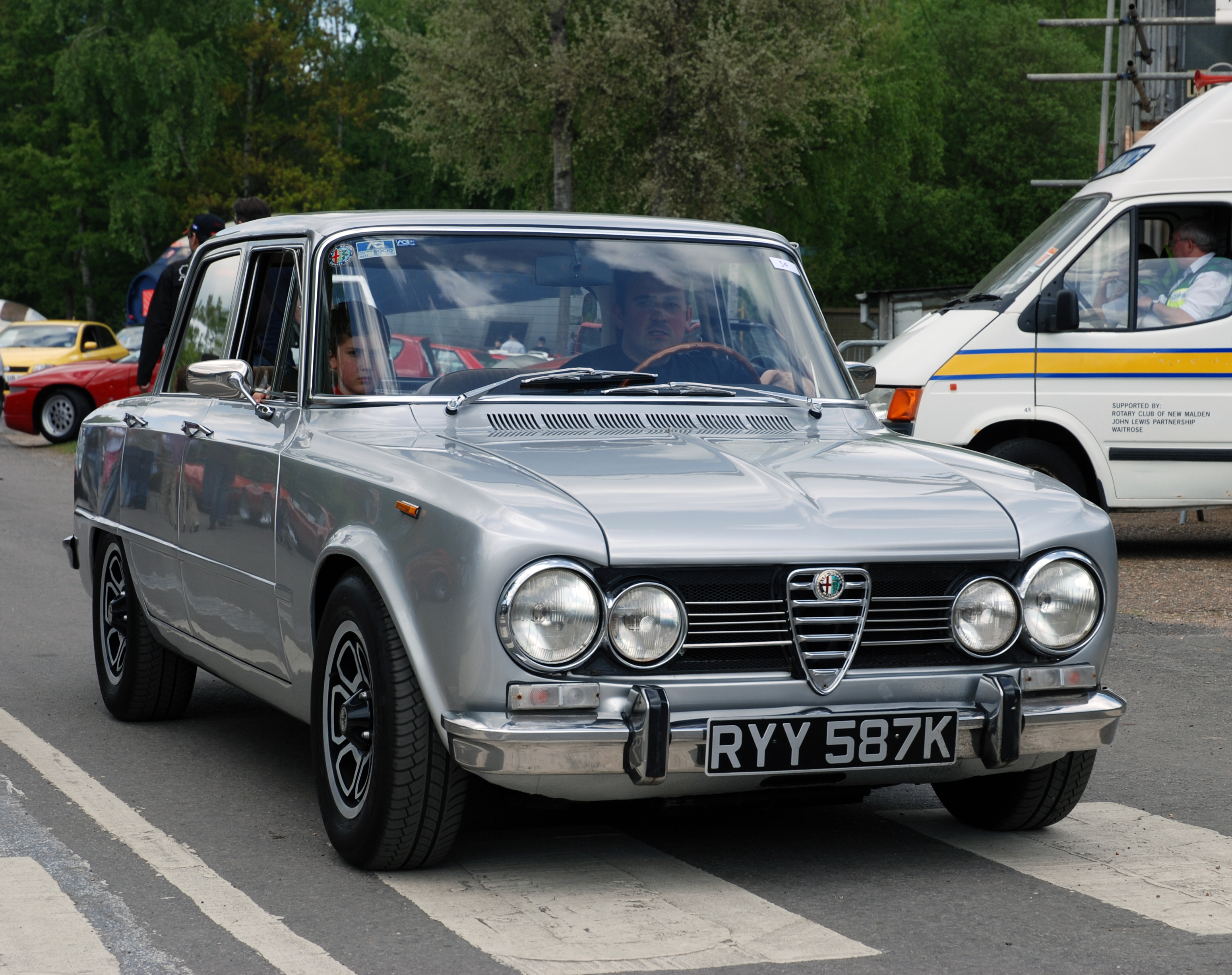 Brooklands,May 2009